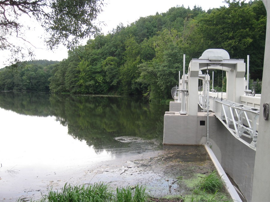 Jaz w Kolbudach